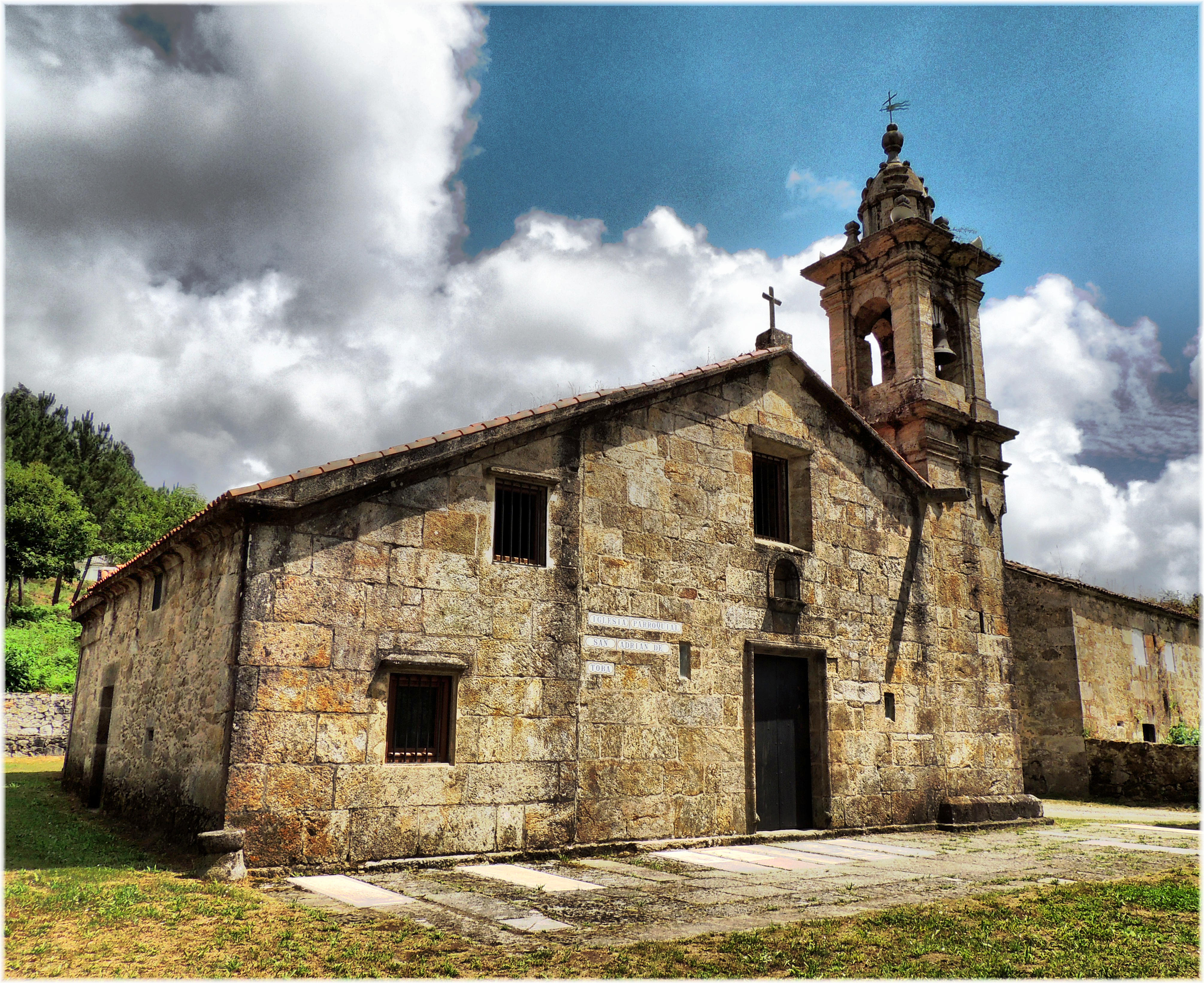 Parroquia de contrastes na que atopamos lugares de alto interese como a Praia de Estorde, con bandeira azul e cámping, ou a Igrexa de San Adrián, con área recreativa e conxunto de muíños de auga. A igrexa é románica, do século XII con planta de cruz latina. Nas súas proximidades atópase un conxunto de sete muíños de auga restaurados en parte nos últimos anos, nun entorno de gran beleza e acondicionado para o descanso Diante da Igrexa atopase o Canastro de Caamaño un horreo de 26 pes.